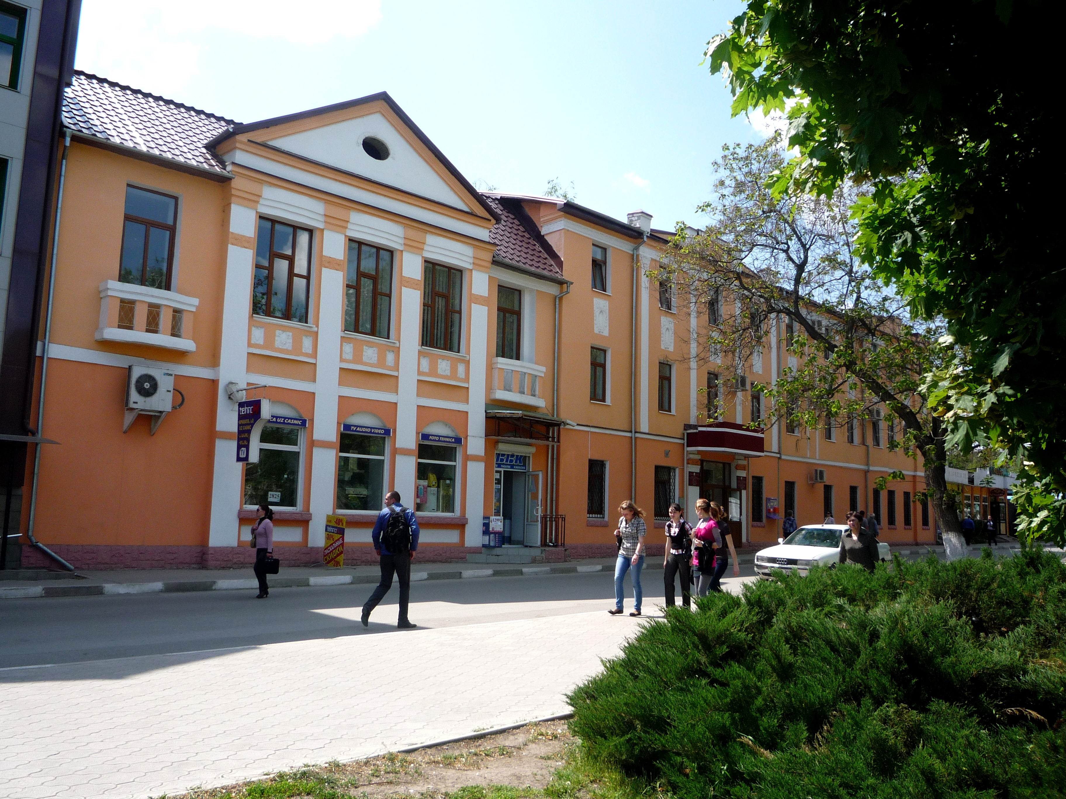 str. Dostoevschi din Bălți